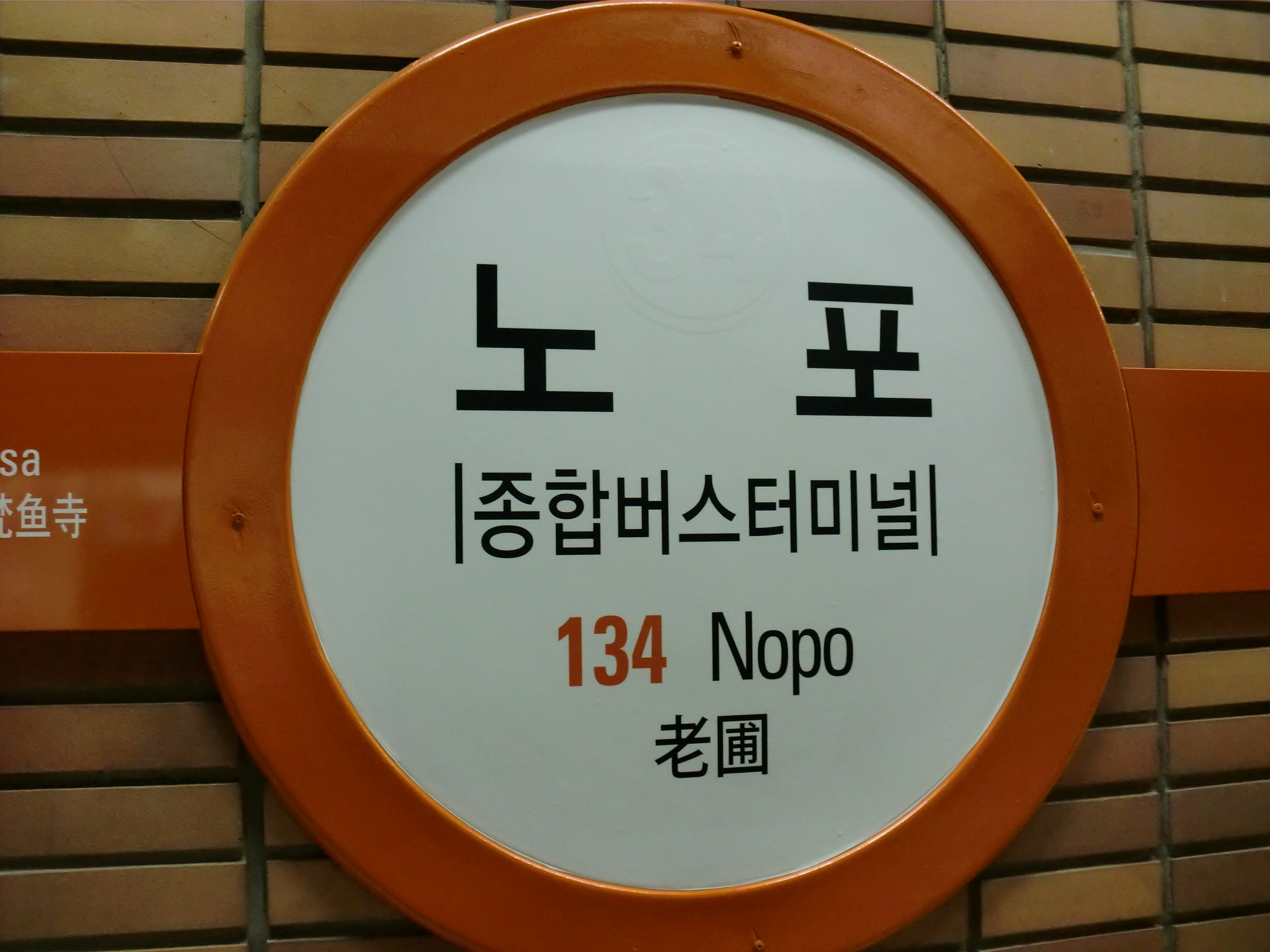 부산도시철도 1호선 노포역의 역명판